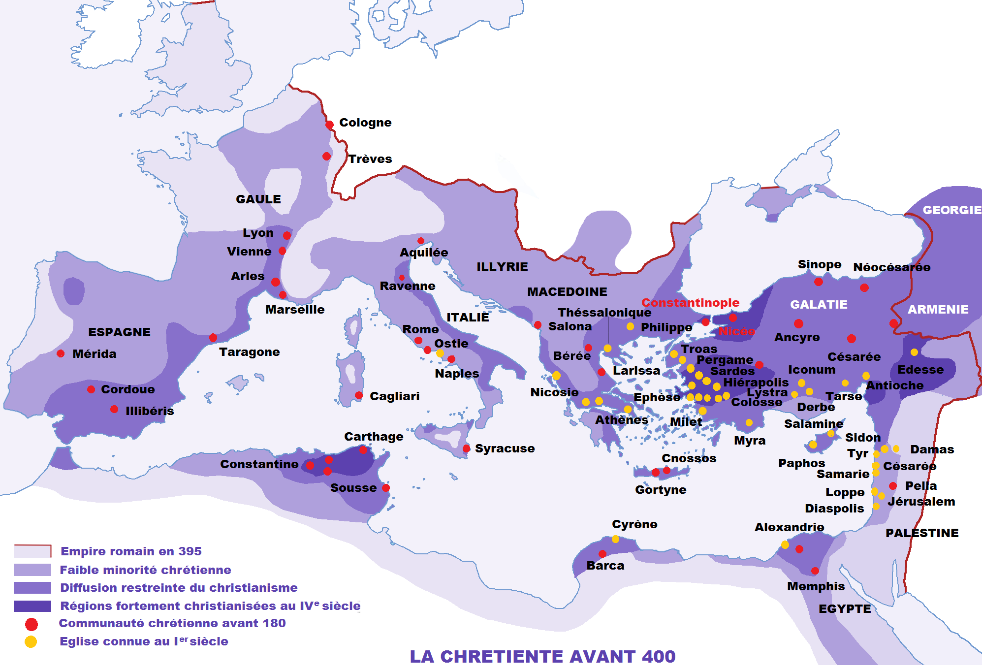 L'empire romain en 395 avec le développement du christianime (rur image commons modifiée)